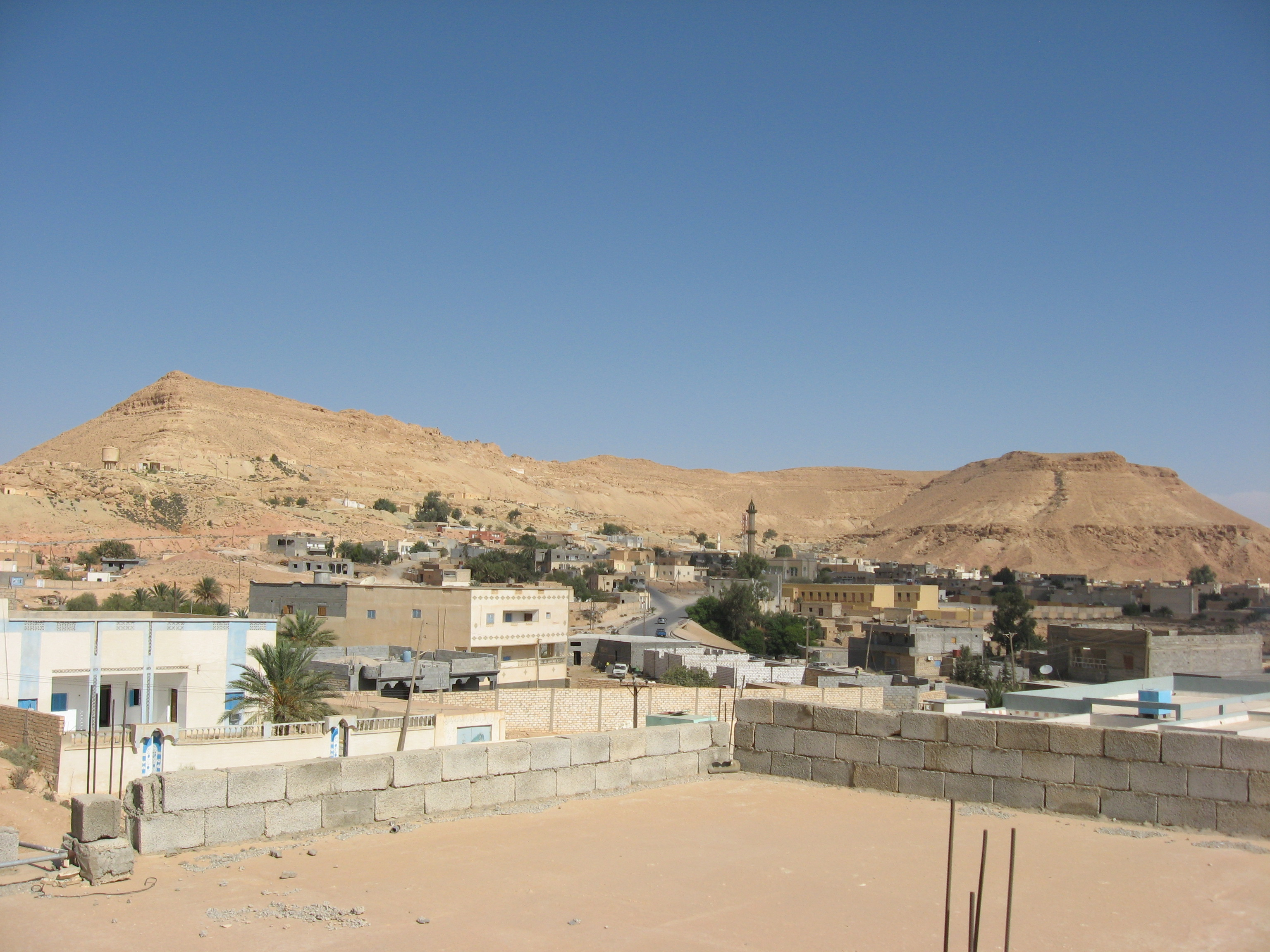 Wazzen center